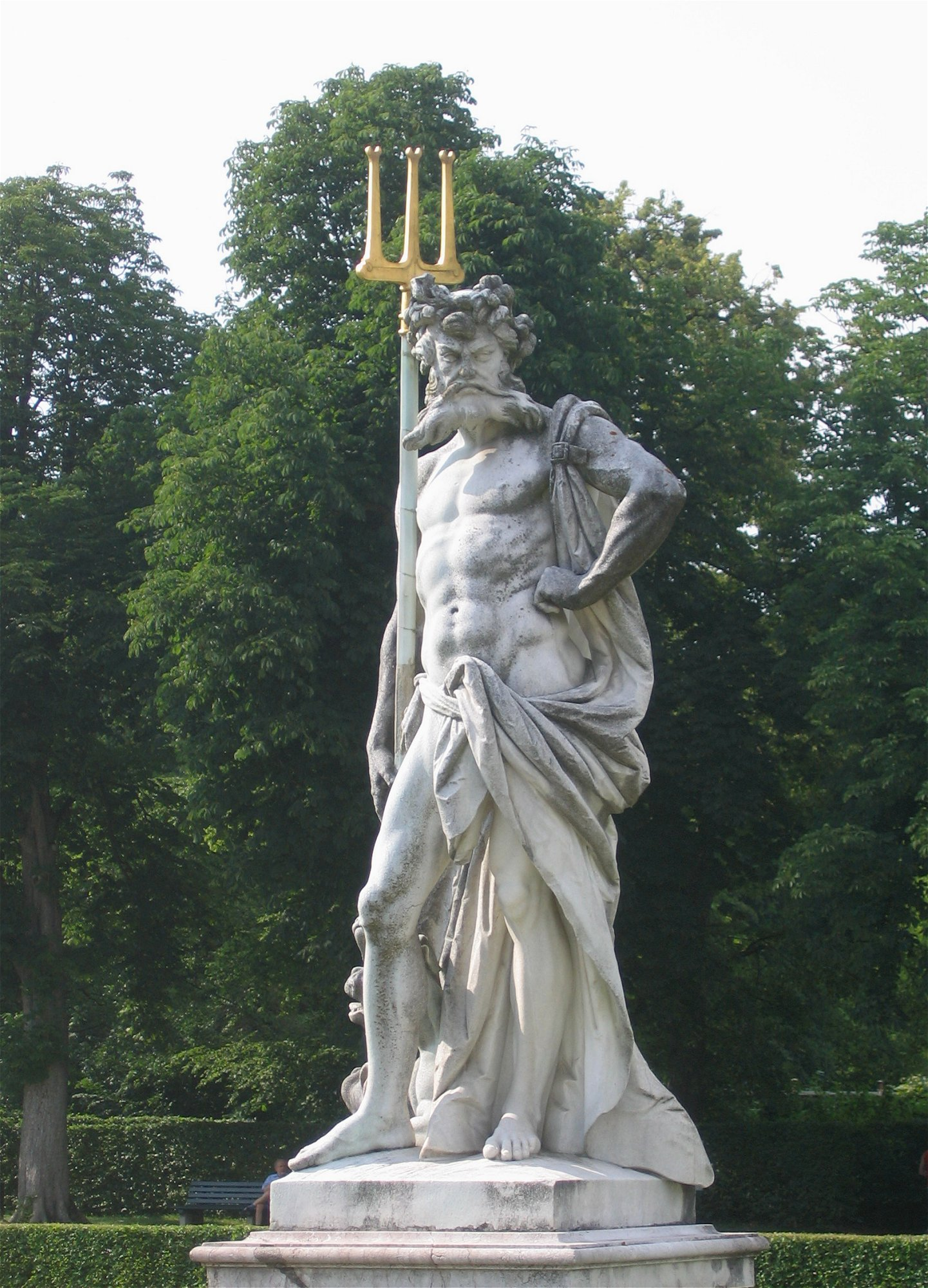 Statue im Schlosspark Nymphenburg, Muenchen, Pluto, von Dominik Auliczek (1778)